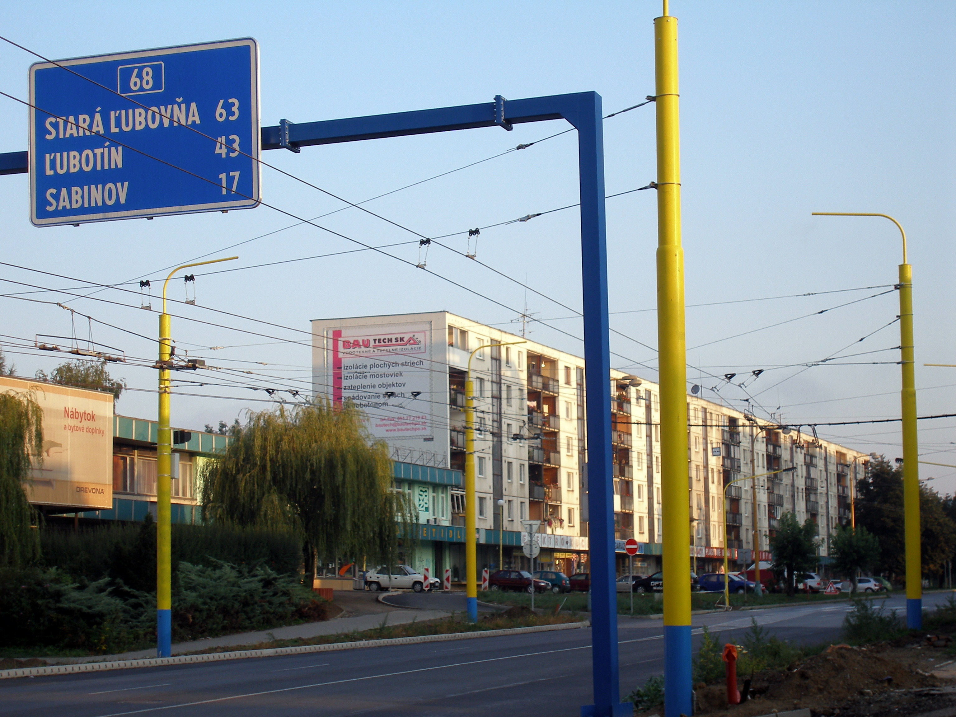 Ulica Sabinovská v meste Prešov